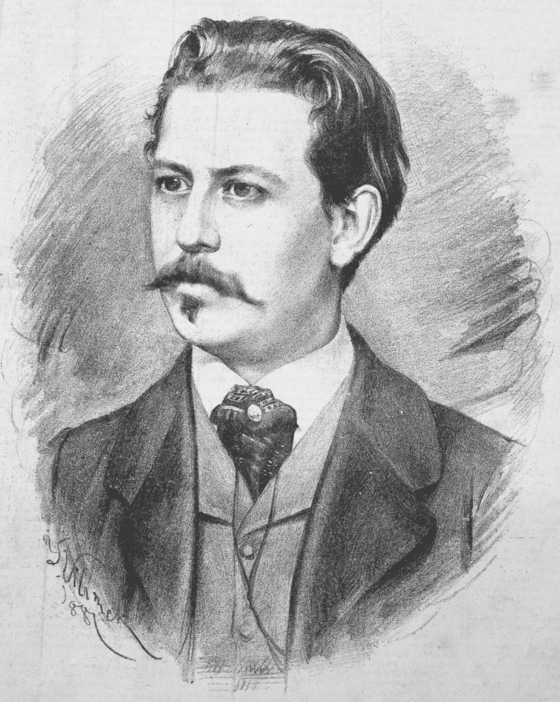 Vilém Blodek (1834 - 1874), skladatel. Portréty osobností od Jana Vilímka